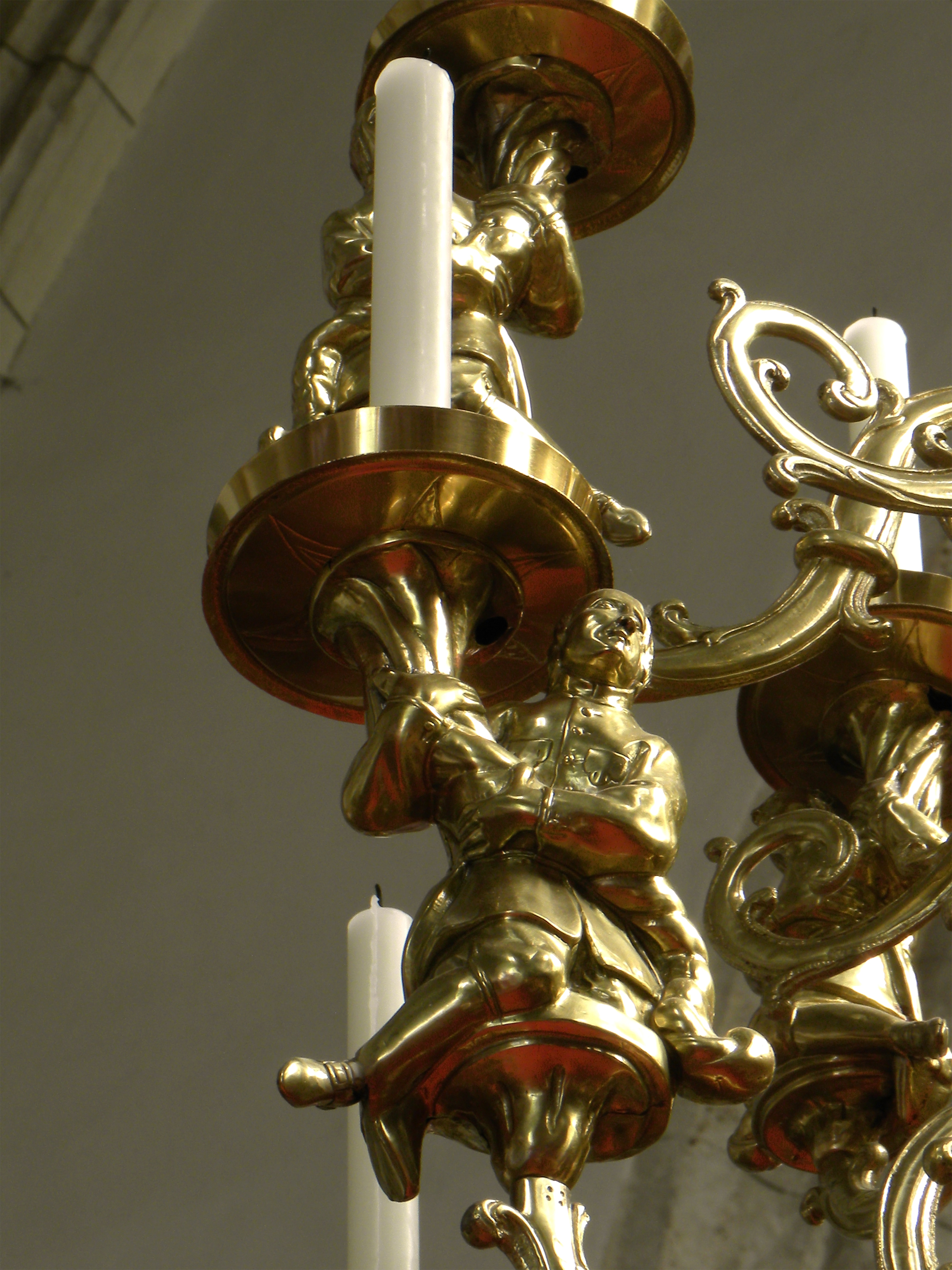 Kirchenfestungsanlage hl. Oswald - einer der Bergmänner am Barbaraluster